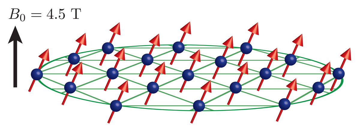 Quantum Simulator Illustration